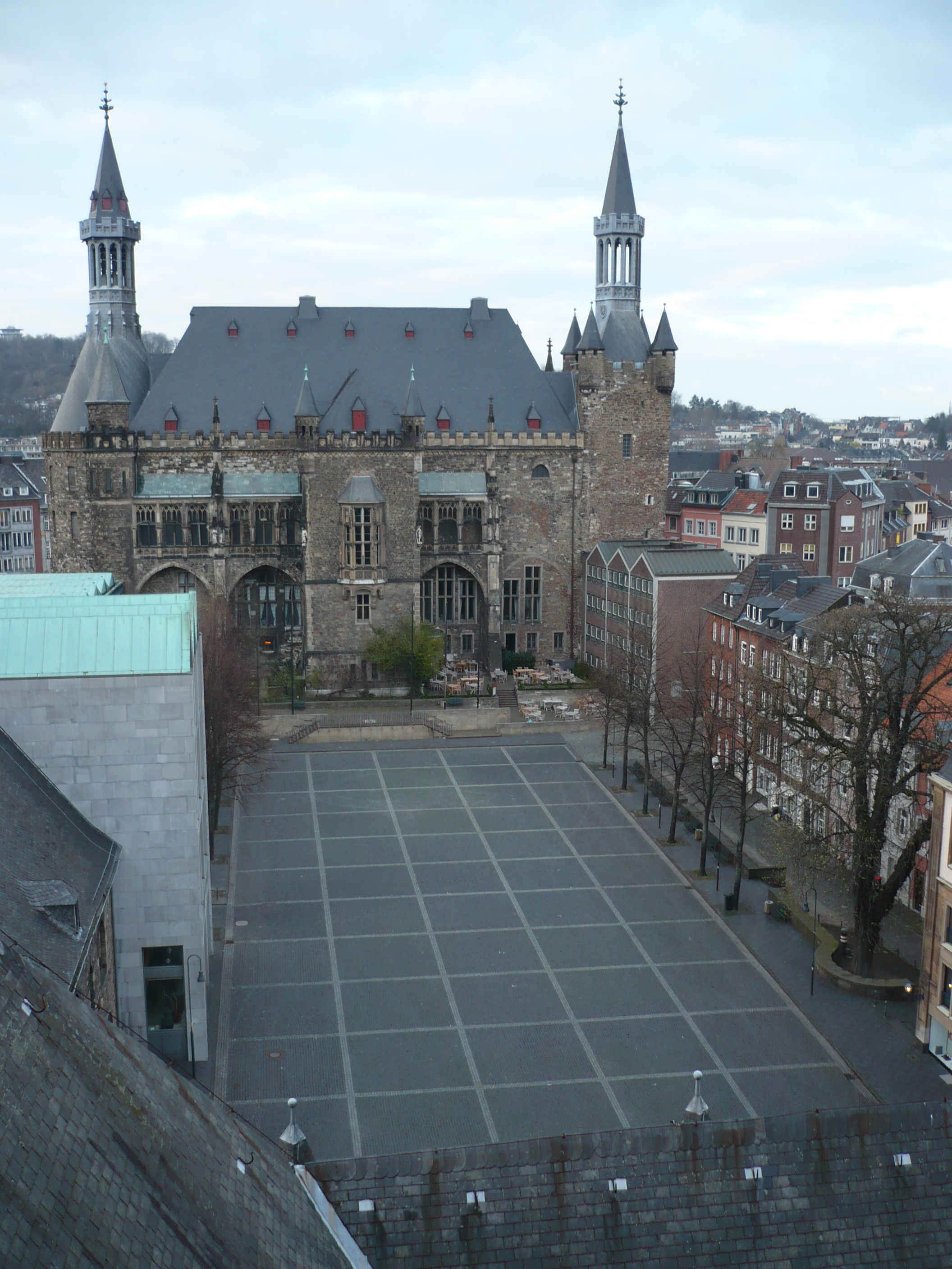 Katschhof, Aachen, Blick aus einem Turmzimmer des Aachener Doms nach Norden auf das Aachener Rathaus